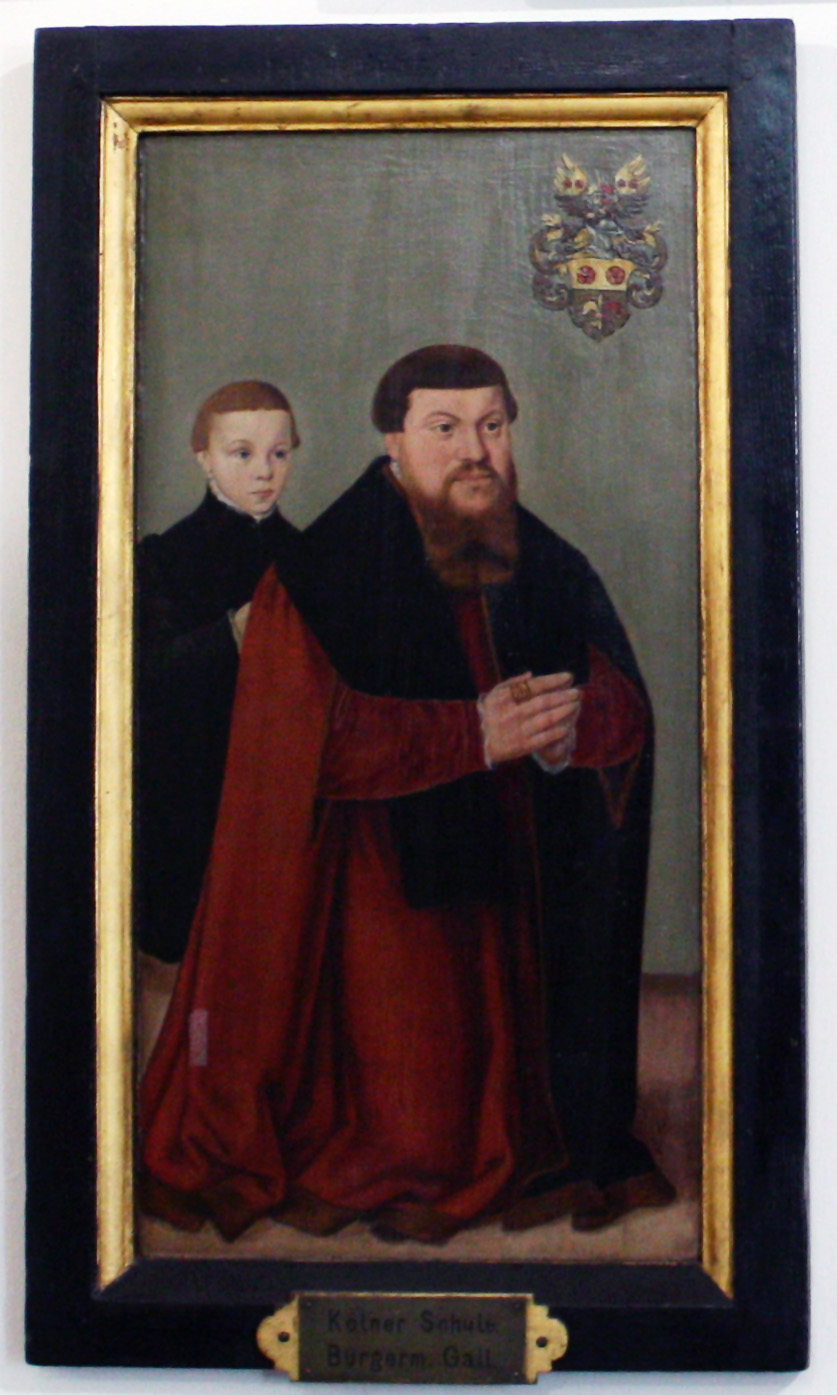 Philipp Gail und sein Sohn Philipp. Gail war Kölner Geschäftsmann, Ratsmitglied, und mehrfach (6×) Bürgermeister der Stadt Köln